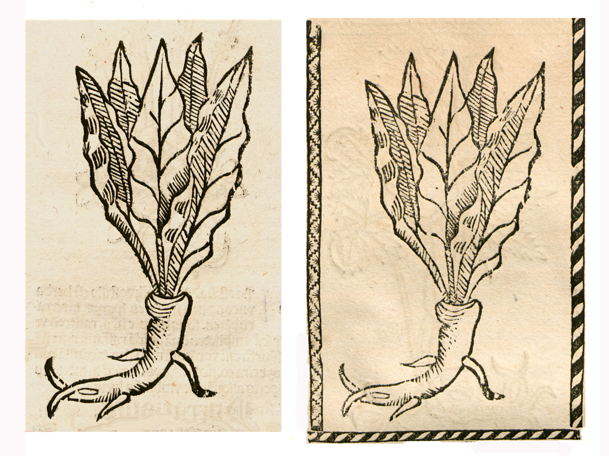 Abbildung von: Alant-Kraut